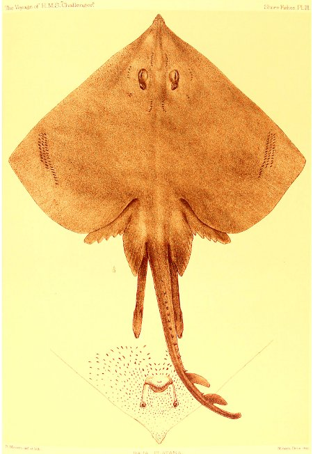 Скат рода Atlantoraja